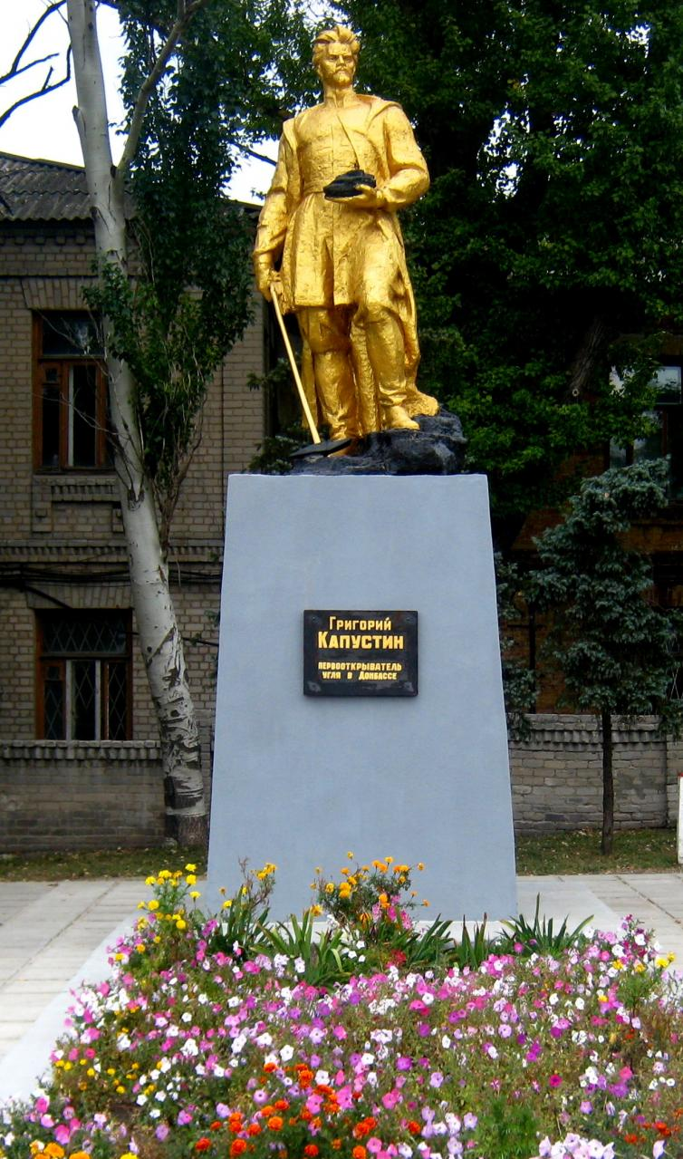 Памятник Капустину в Лисичанске